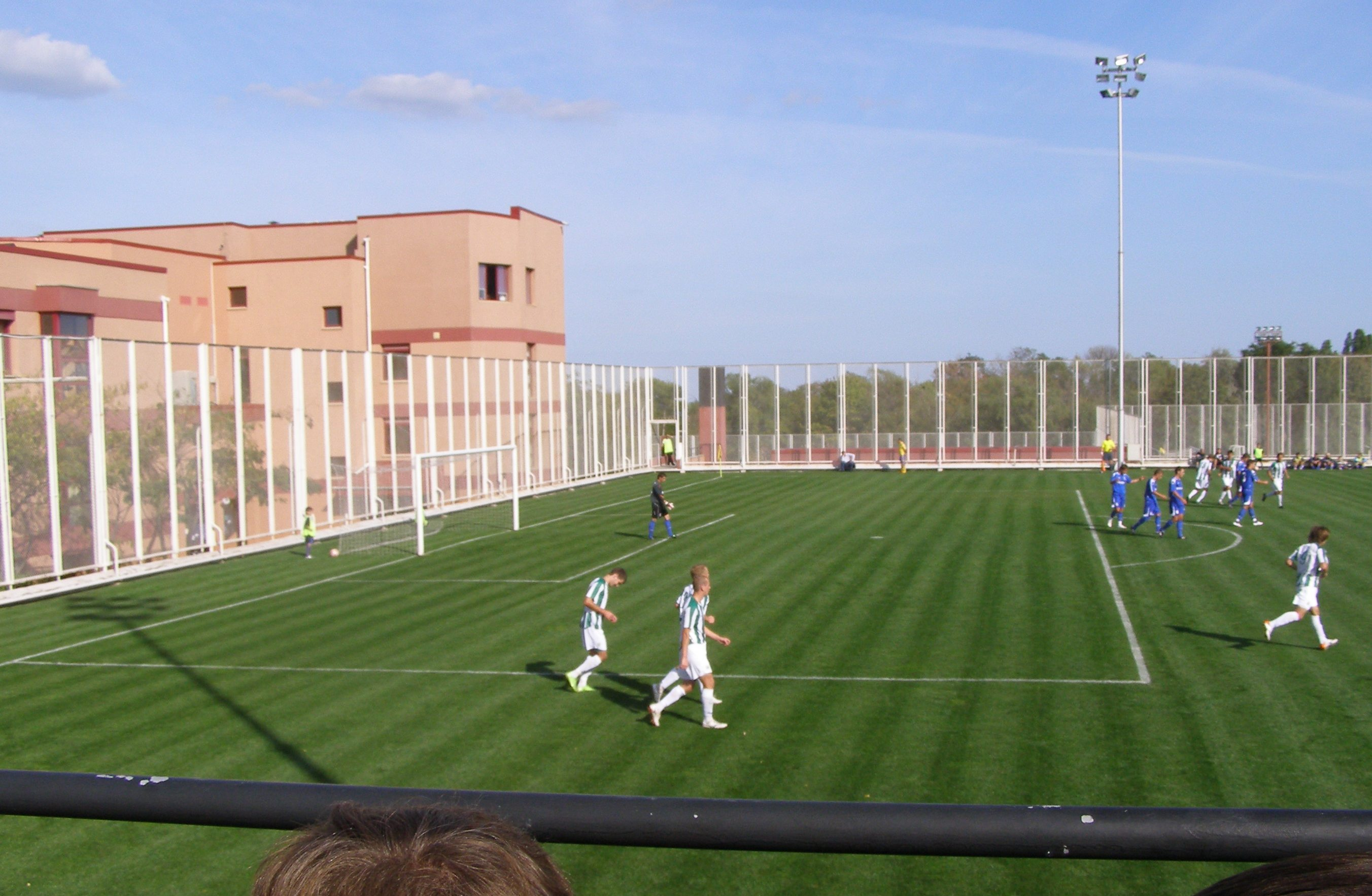 Lustdorf-Trainingszentrum in Sauvignon (Odessa)